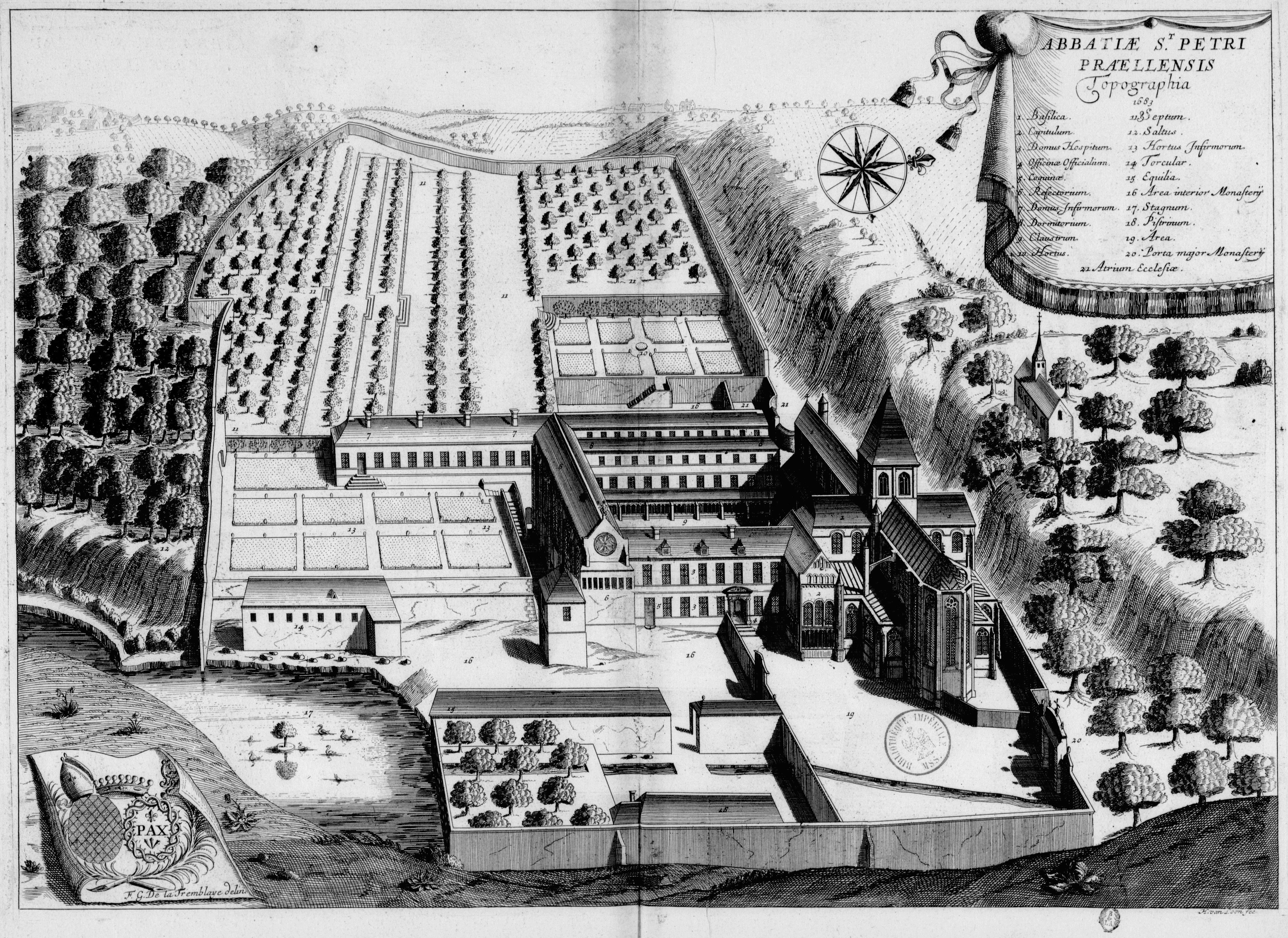 Planche gravée du 17ème siècle représentant l'abbaye Saint-Pierre des Préaux, dans le livre Monasticon Gallicanum.